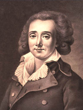 Portrait de Pierre Clément de Laussat